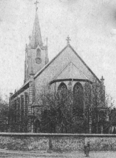 evangelische Kirche Salbke